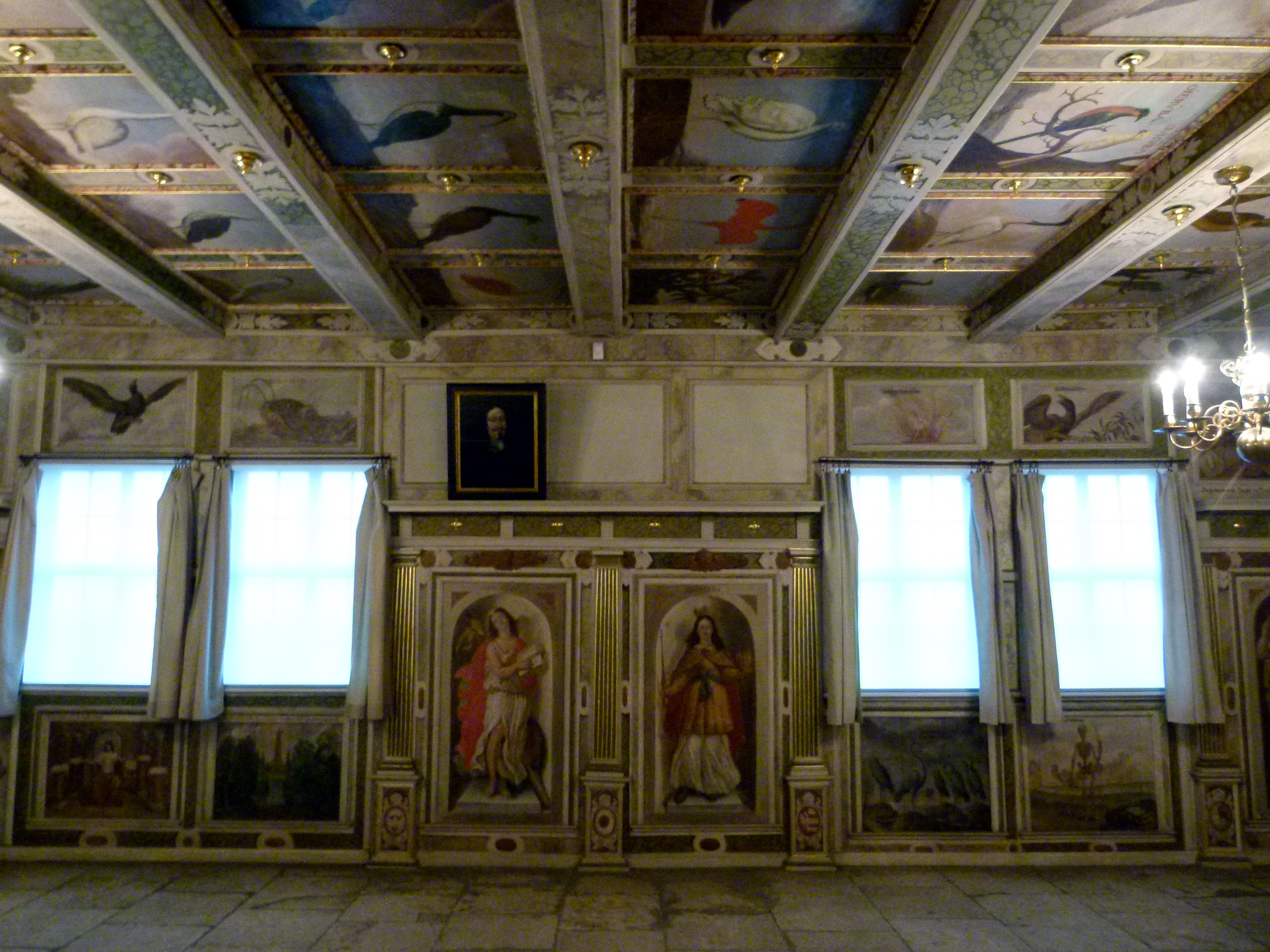 Festsaal des Lust- und Berghauses des Städtischen Weingutes Hoflößnitz in Radebeul